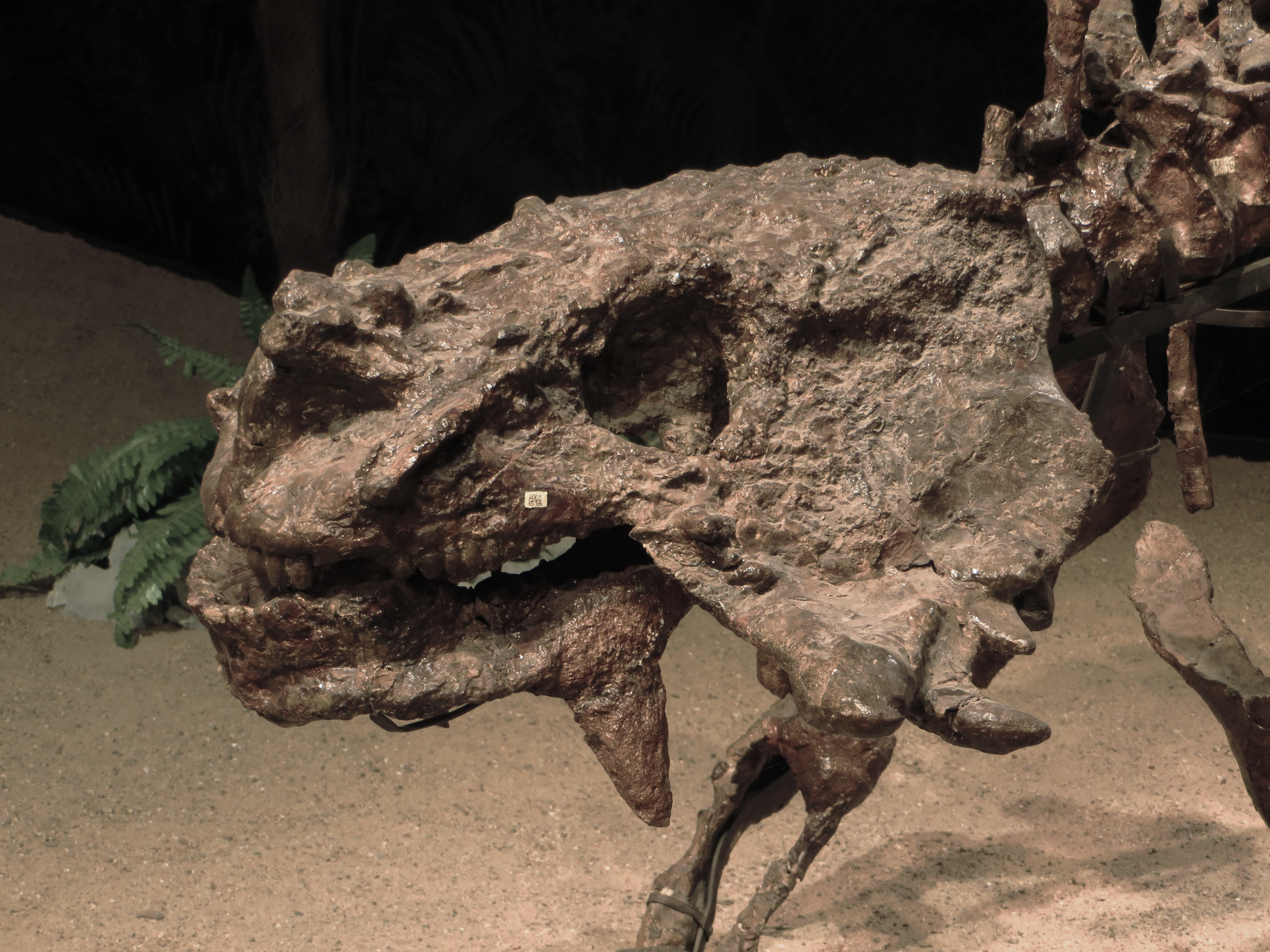 Fossil of Scutosaurus, an extinct reptile- Took the picture at Dinosaurium, Prague